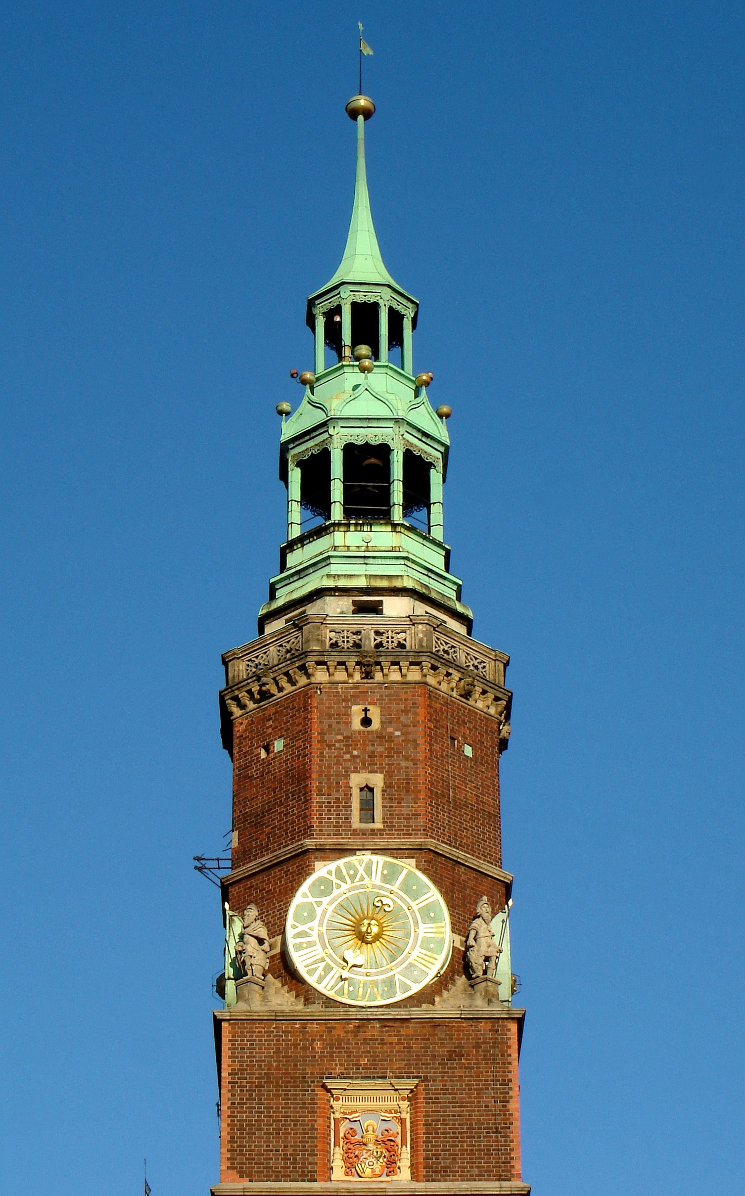 Polen: Turm des Breslauer Rathauses